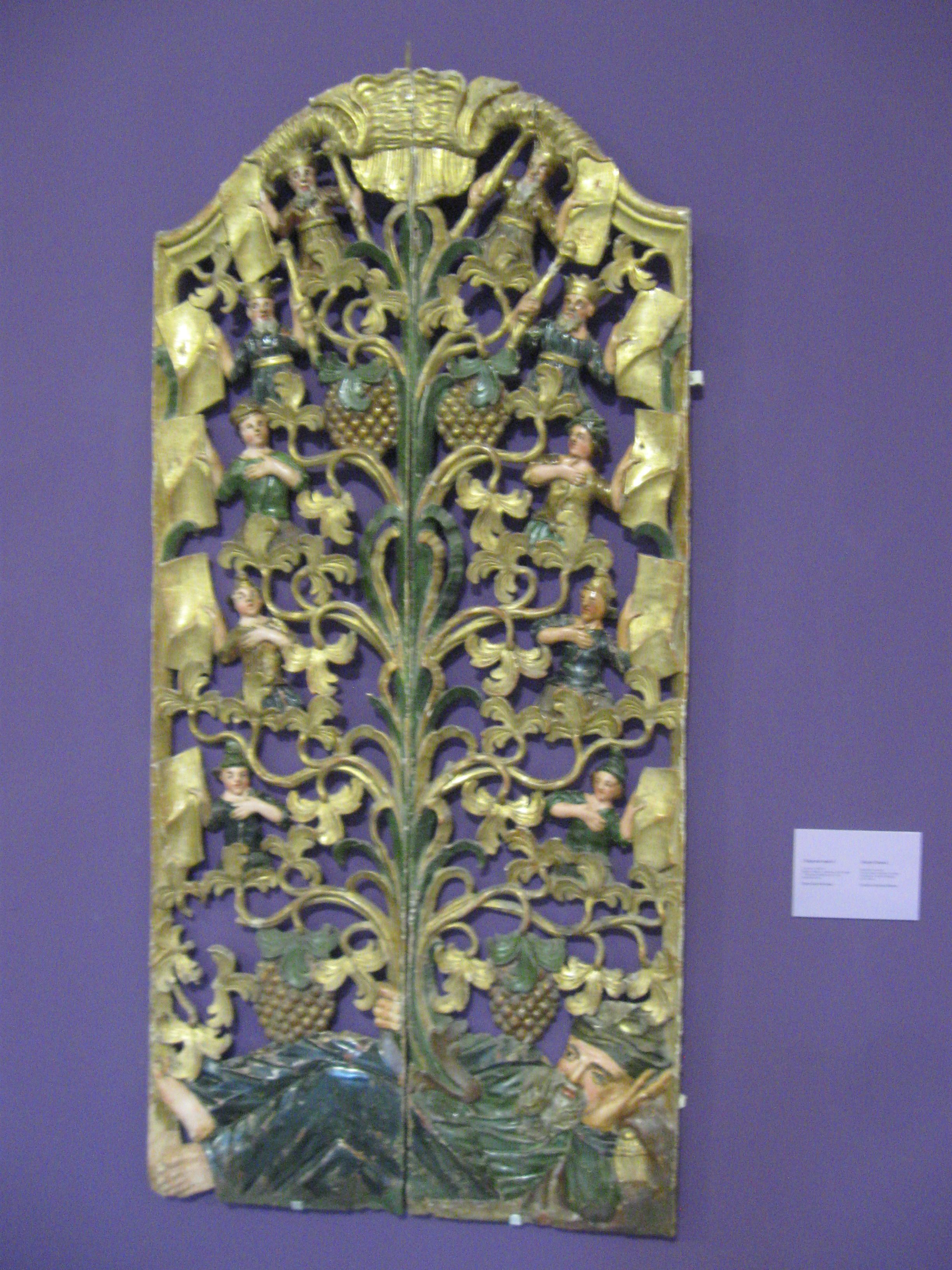 Царські врата із с. Черхава, Самбірський р-н, Львівська обл. (1-ша пол. XVIII ст., дерево, левкас, темпера, різьблення. Музей "Дрогобиччина") Виставка "Велике і Величне". Мистецький арсенал. 2013